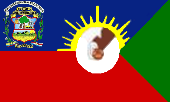 Bandera del municipio Arístides Bastidas, estado Yaracuy, Venezuela